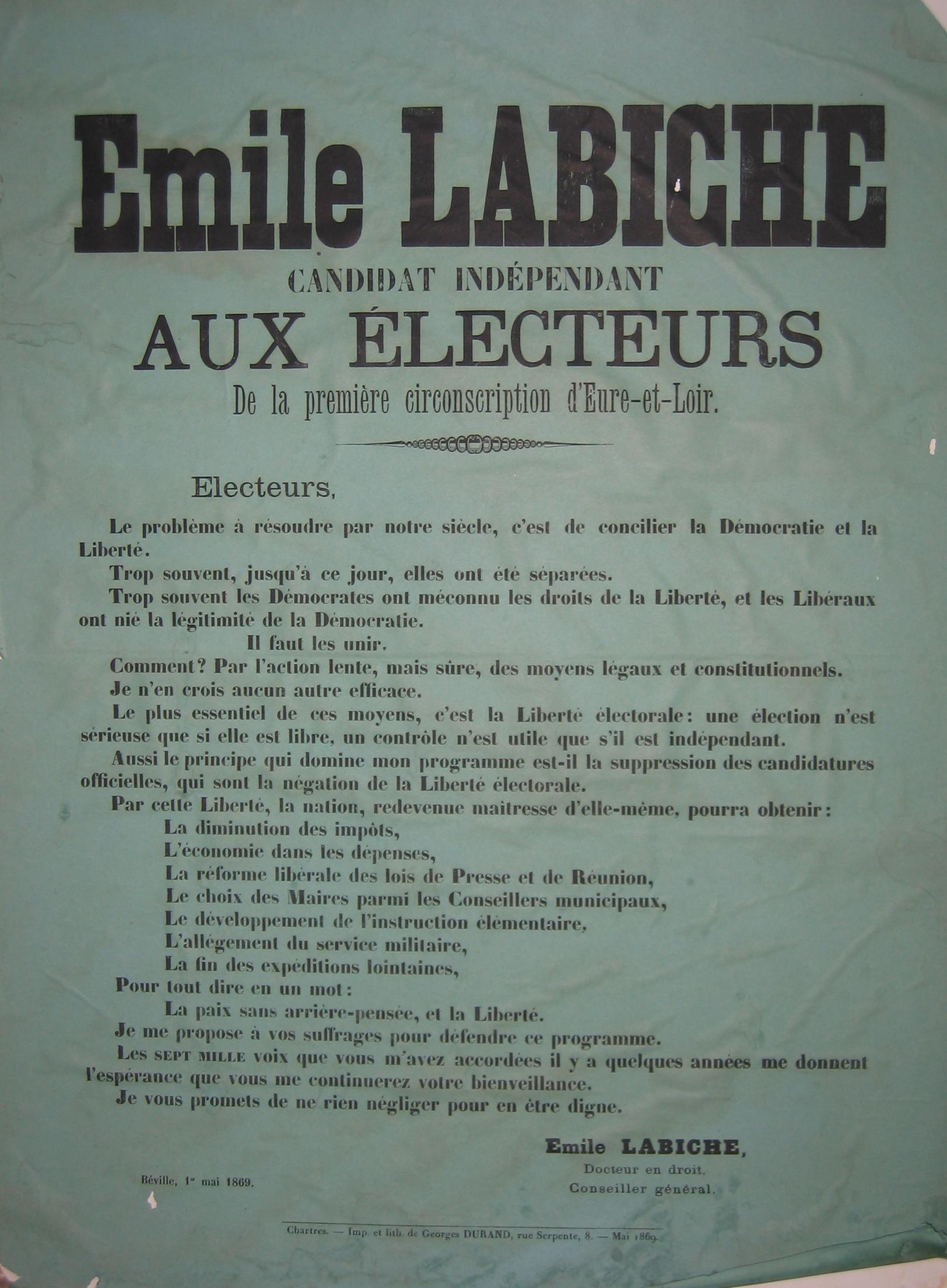 Affiche électorale d'Emile Labiche